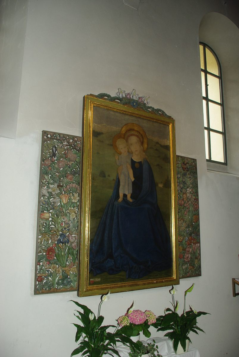 Bild der Mutter Gottes aus der Mädchenschule in der Pfarrkirche St. Nikolaus in 83435 Bad Reichenhall